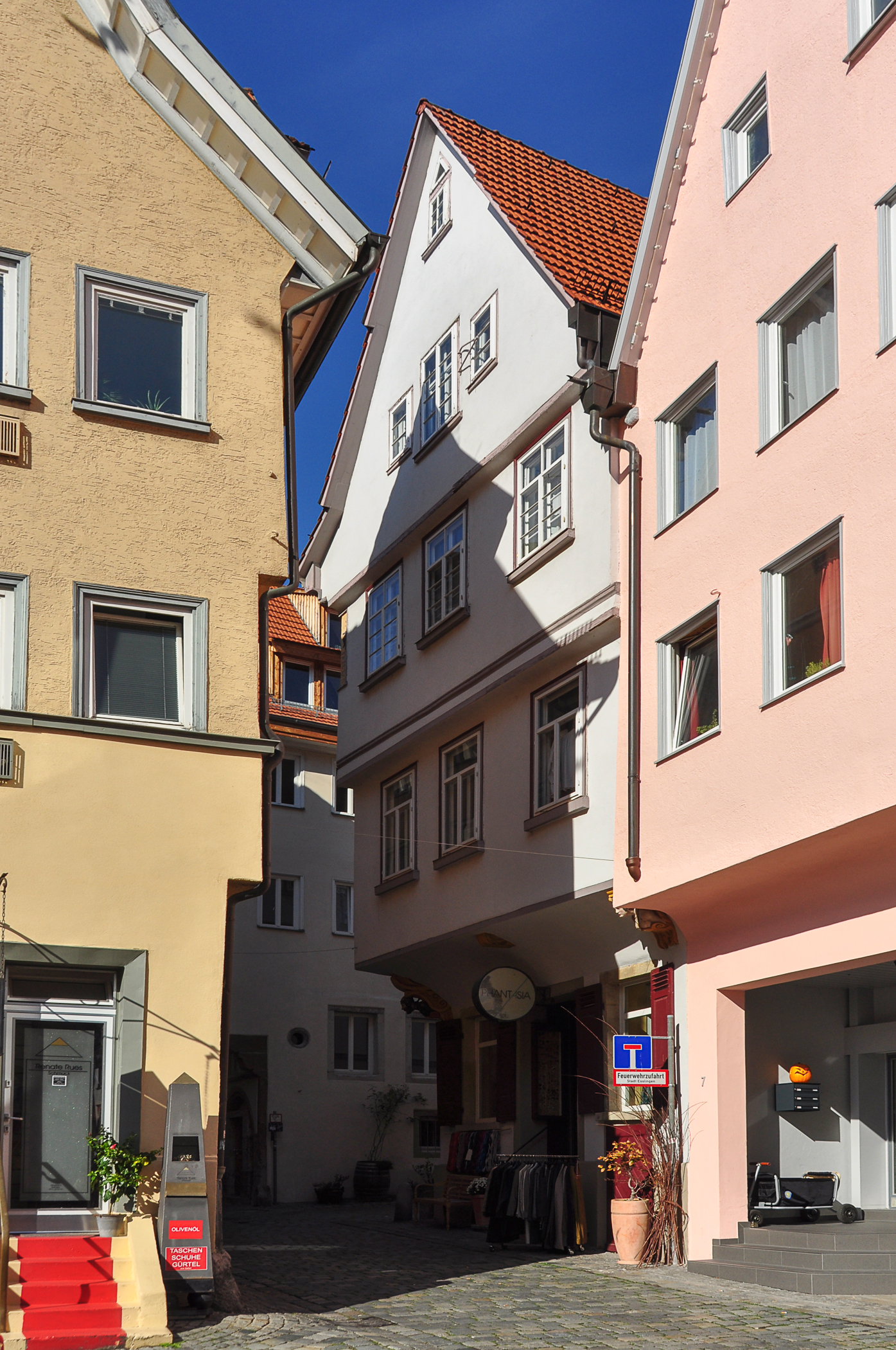 denkmalgeschütztes Wohn- und Geschäftshaus in der Esslinger Kernstadt zwischen Heugasse 6 und 7 (in der Mitte).